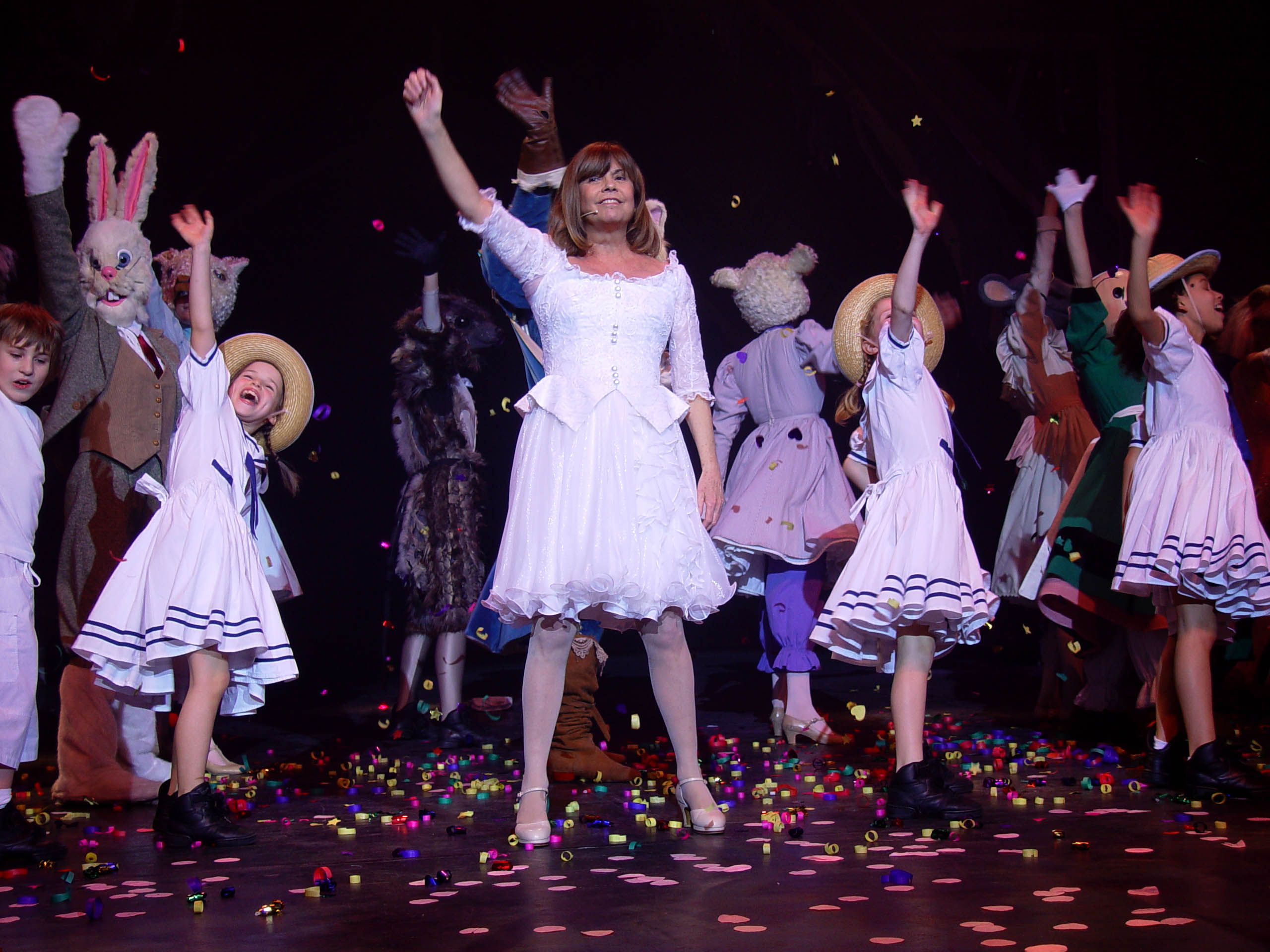 finale spectacle 2007, photo prise par Michaël Bemelmans.